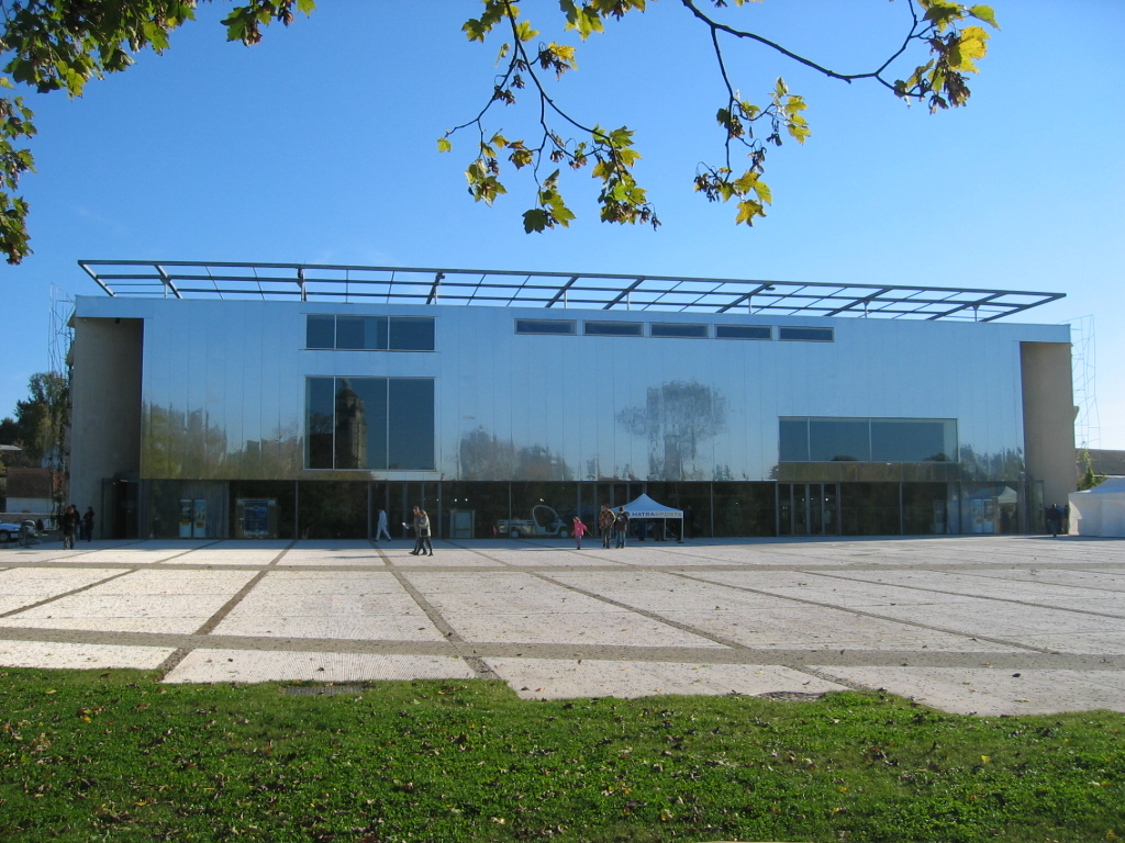 Parc des expositions de la Commanderie - Dole - Jura - France